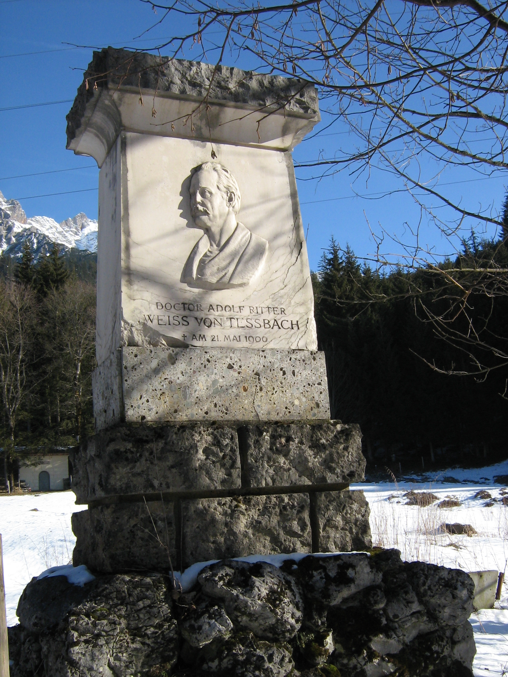 Denkmal des Wohltäters Adolf Ritter Weiß von Teßbach im Stadtteil Bürgerau in Saalfelden (Österreich).